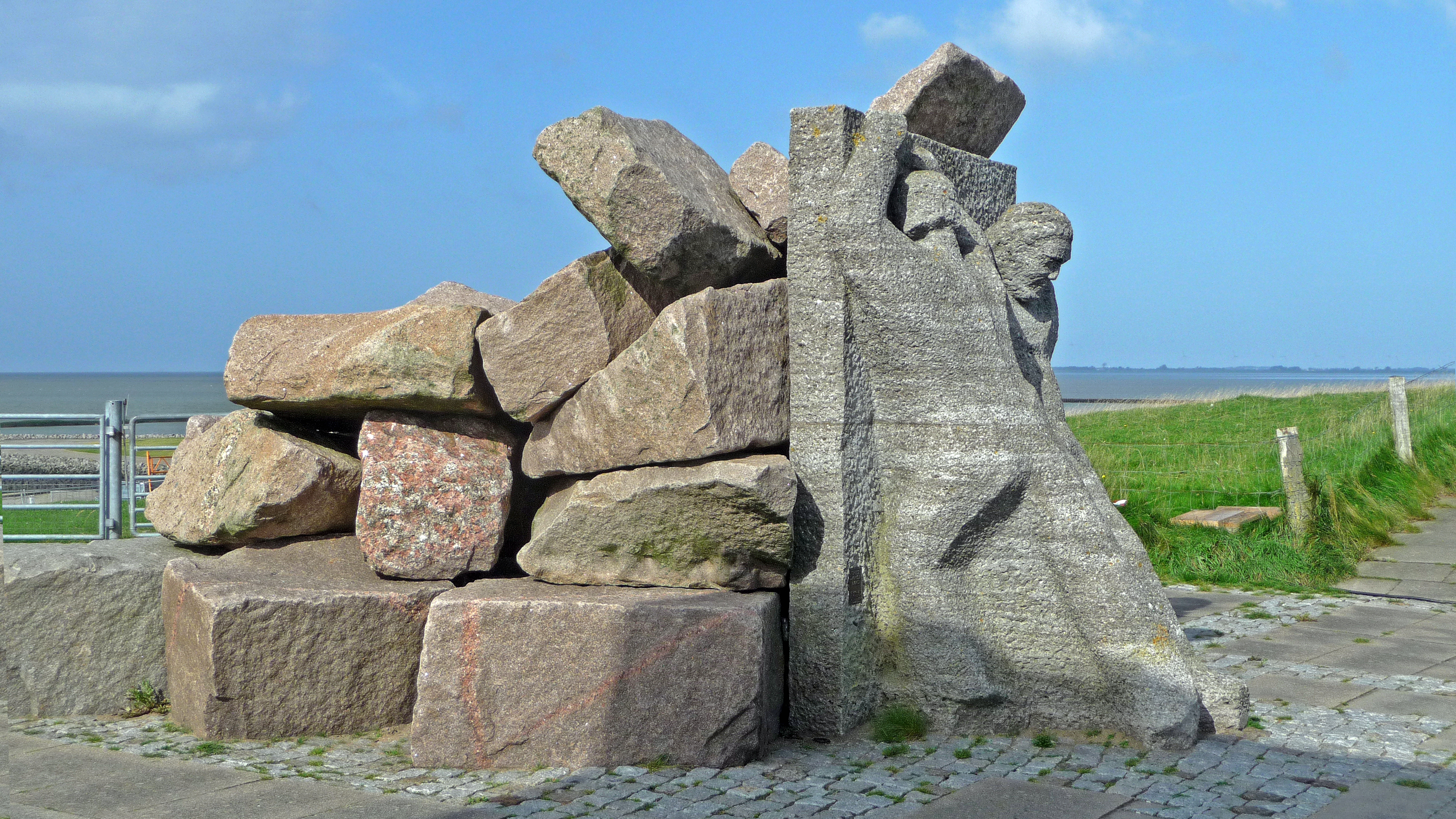 Deicharbeiterdenkmal "Trutz Blanker Hans" in Meldorf / Kreis Dithmarschen / Land Schleswig-Holstein von Paul H. Gnekow aus dem Jahr 1978. Es steht auf der Deichkrone am Meldorfer Hafen.